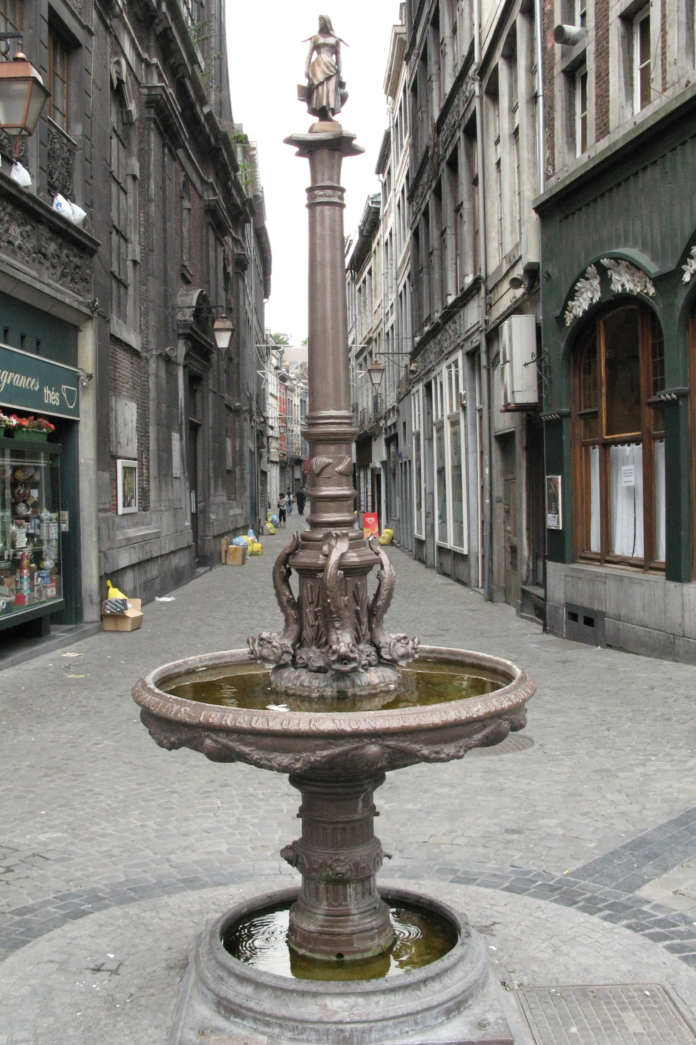 La Fontaine Montefiore à Liége En Neuvisse